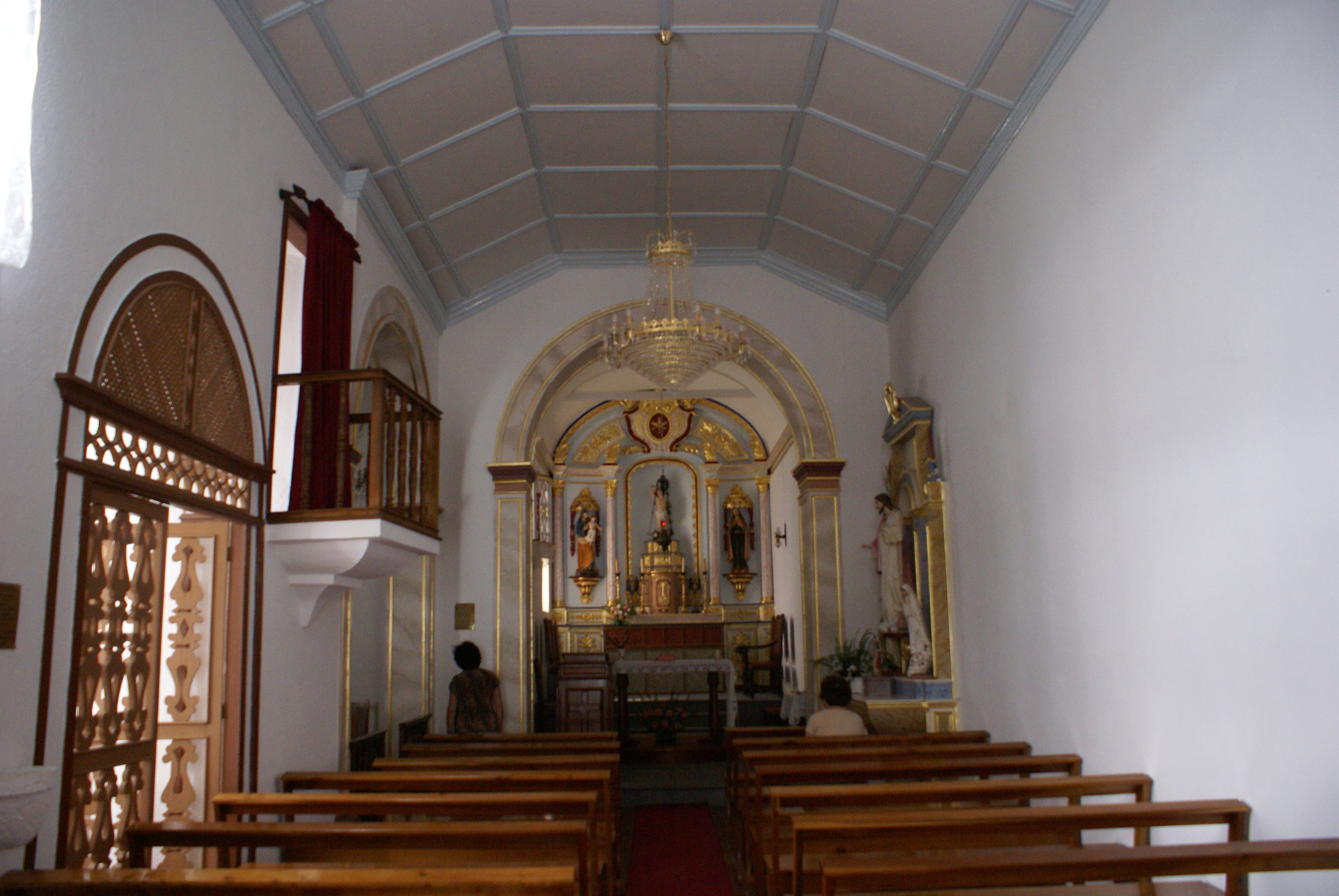 Capela de São Sebastião, Fajã dos Vimes, interior, Calheta, ilha de São Jorge, Açores